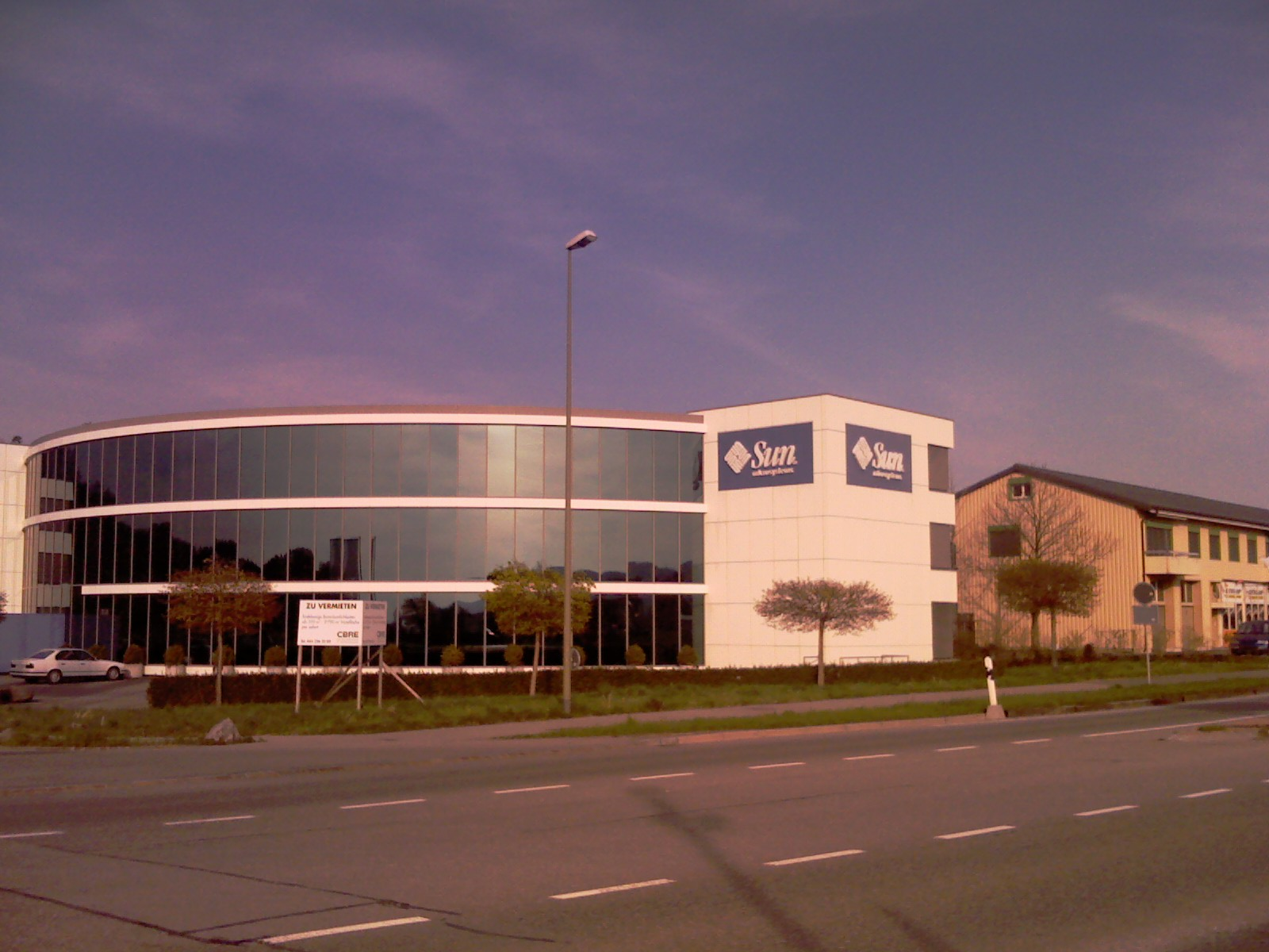 Sidejo de la entrepreno Sun en Hegnau, komunumo Volketswil, Kantono Zuriko, Svislando